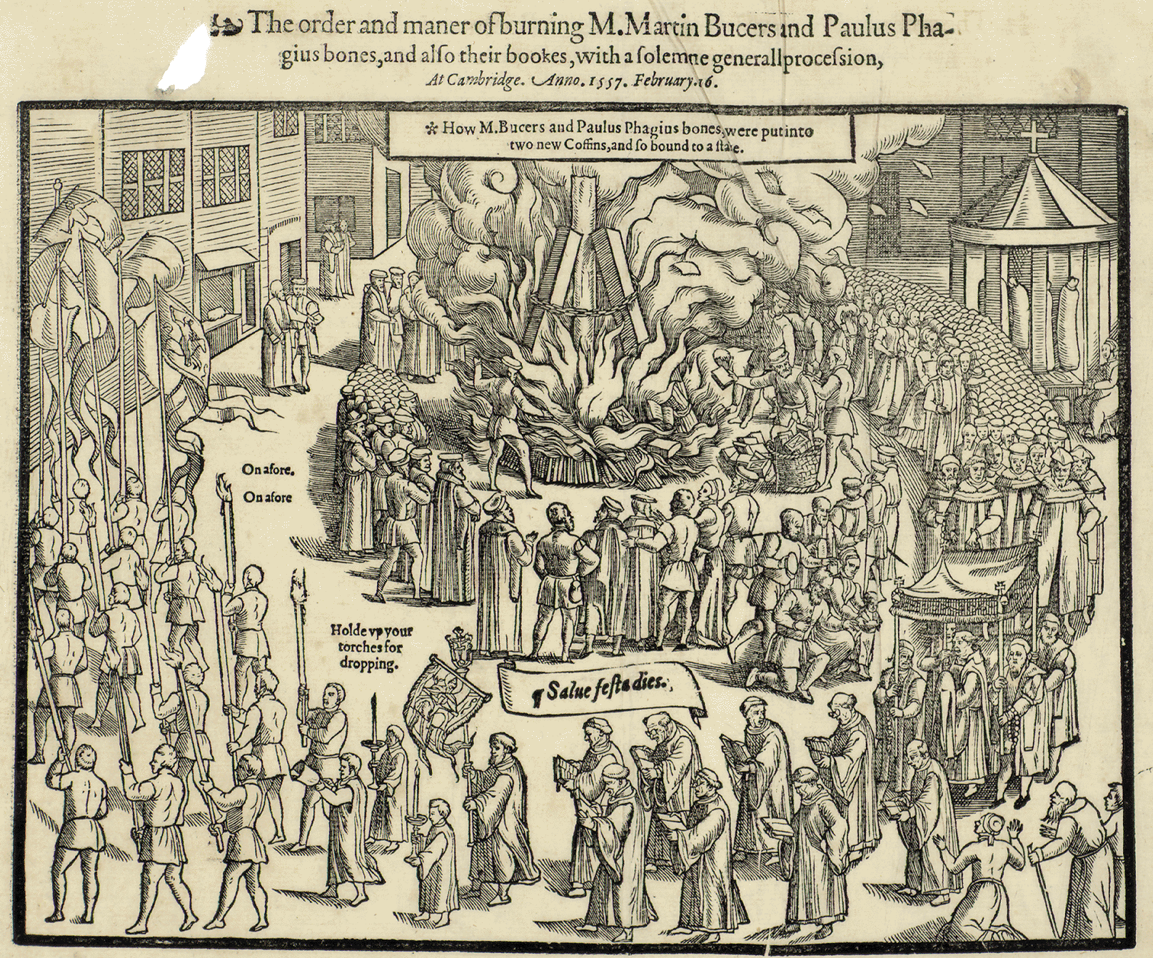 Le corps du réformateurMartin Bucer fut brûlé comme hérétique en 1556, sous le règne de Marie Ire d'Angleterre. Cette gravure sur bois est tirée d' Actes and Monuments, plus connu sous le titre de Livre des Martyrs, de John Foxe.